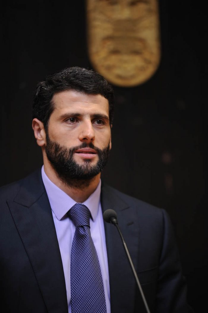 Aleksandar Sapić 2016